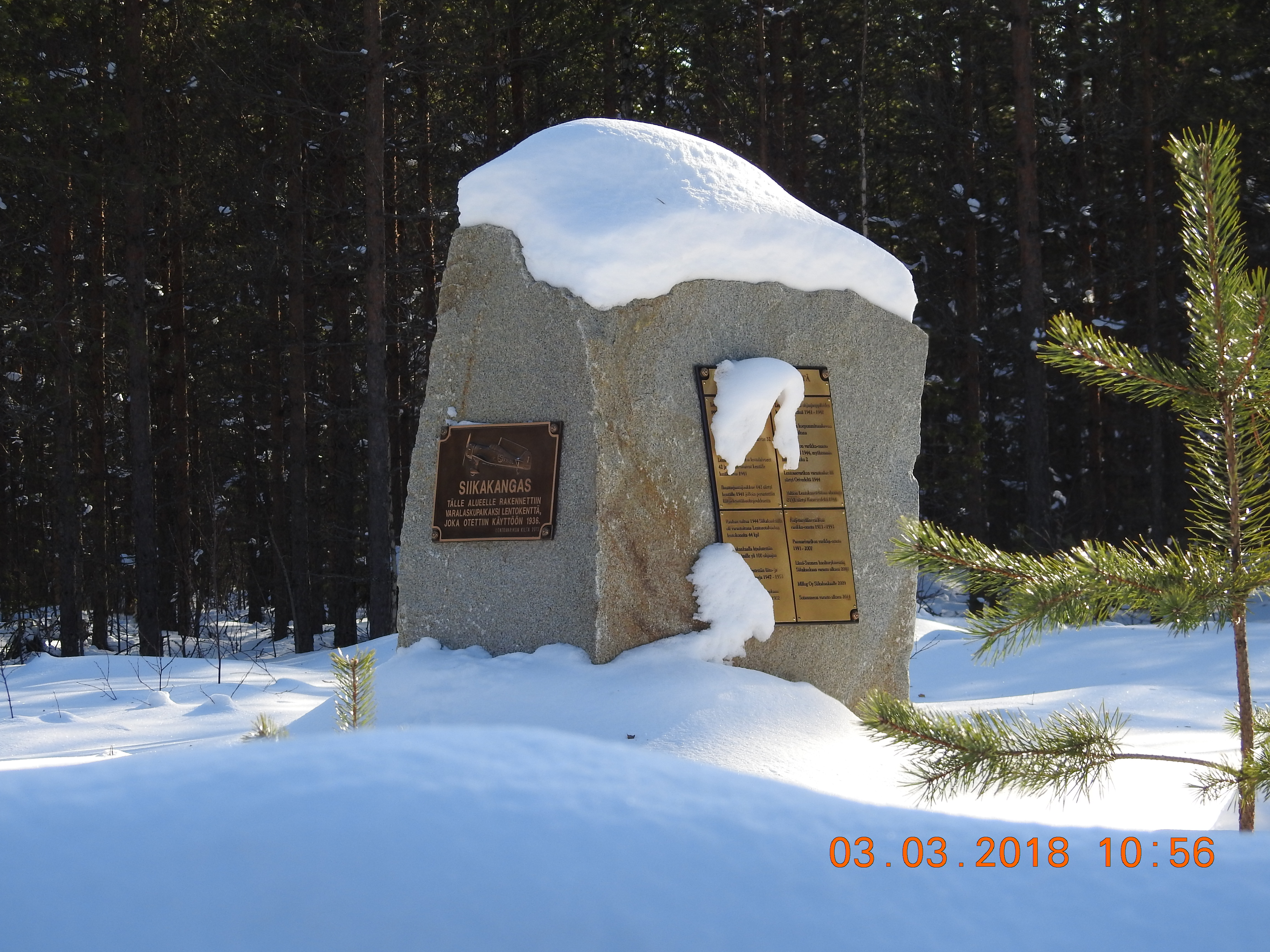 Siikakankaan lentokentän muistomerkki